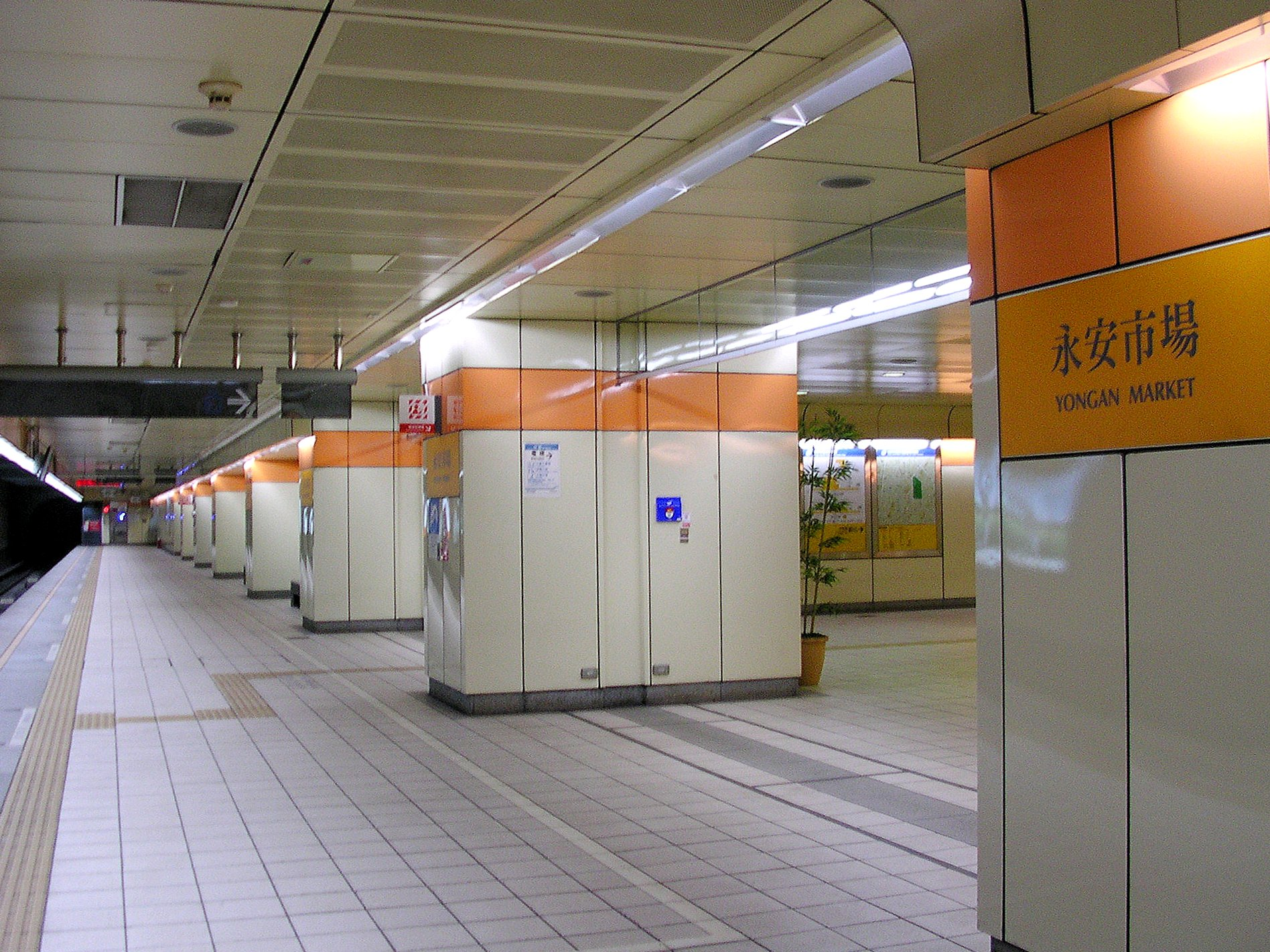 Inside Taipei MRT Yongan Market Station